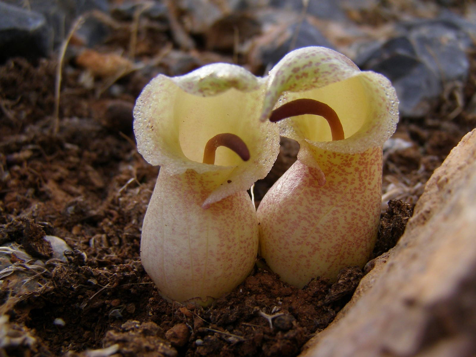 Biarum davisii aus der Familie Araceae, gefunden bei Sougia, Südwest-Kreta